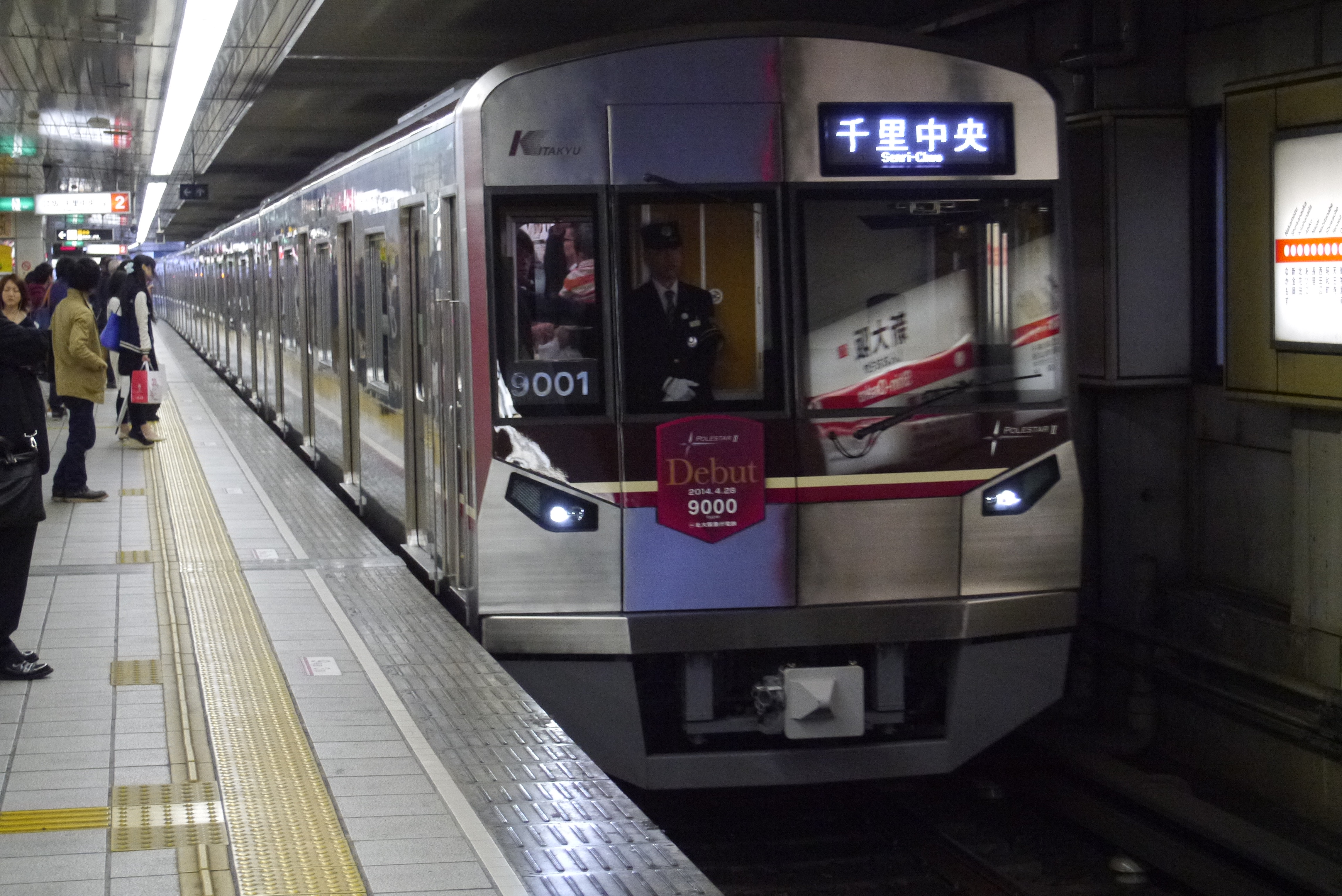 北大阪急行9000形。（新大阪駅）